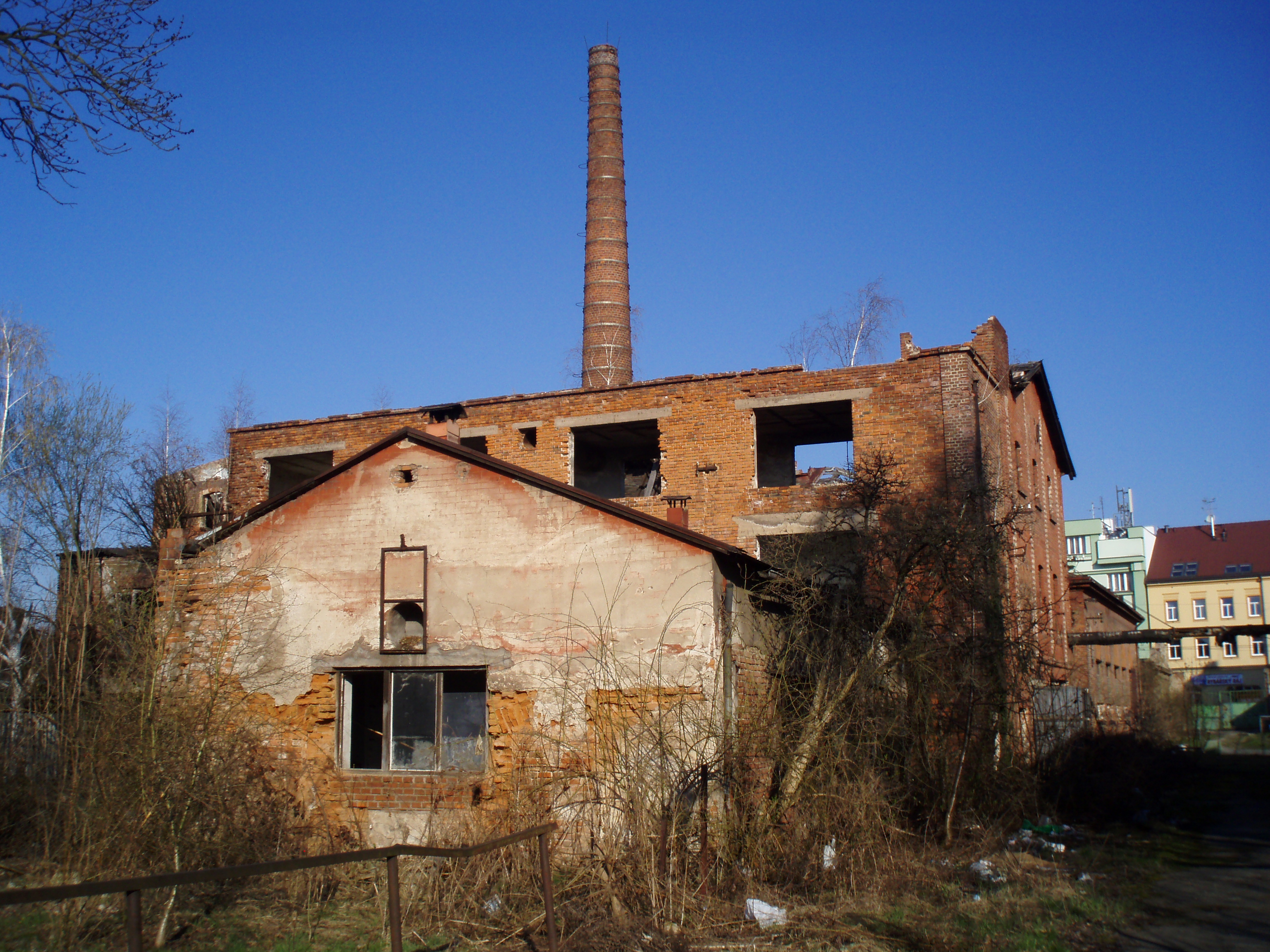 Kuklenská koželužna